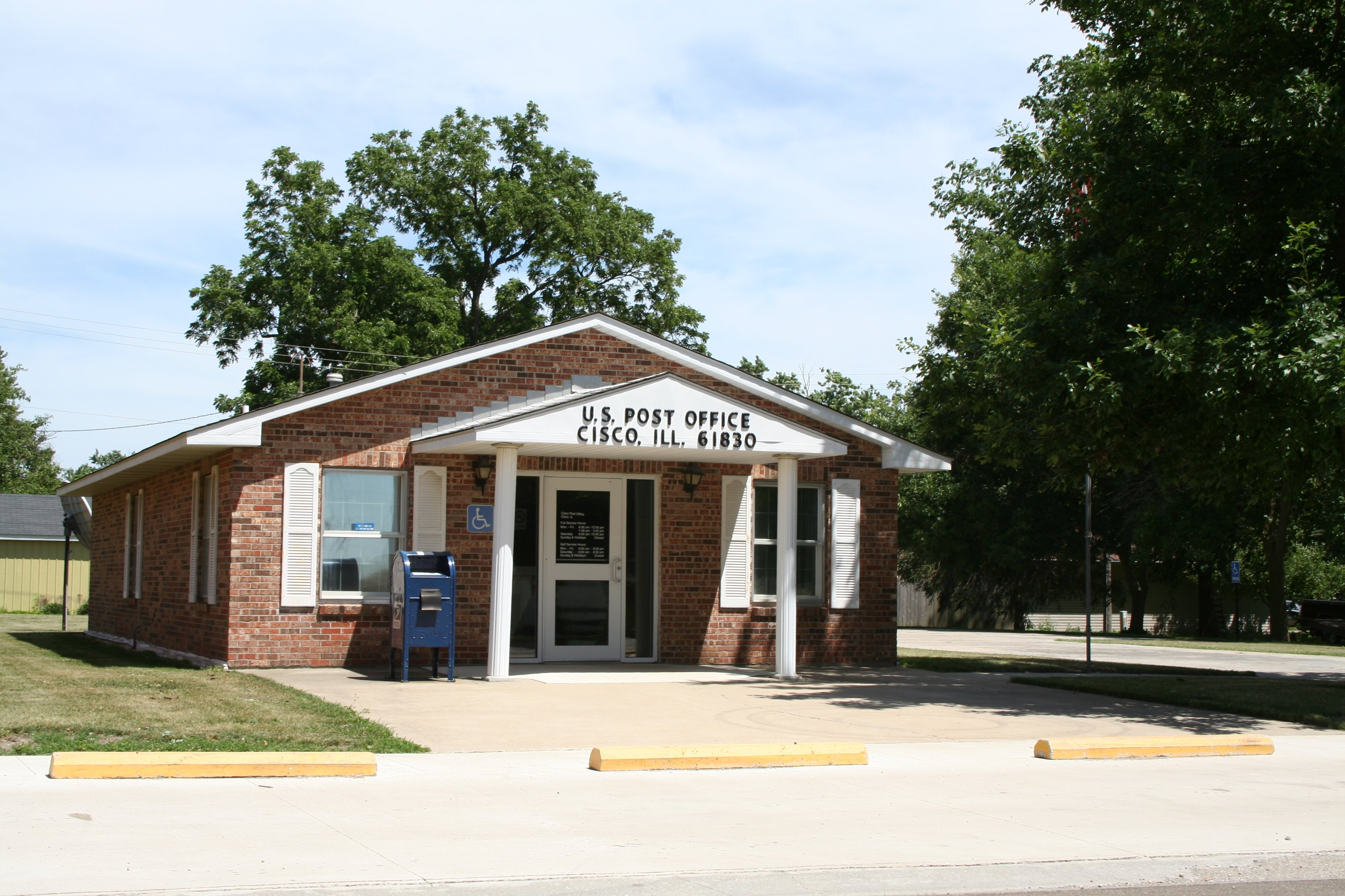 Cisco_Illinois_Post_Office